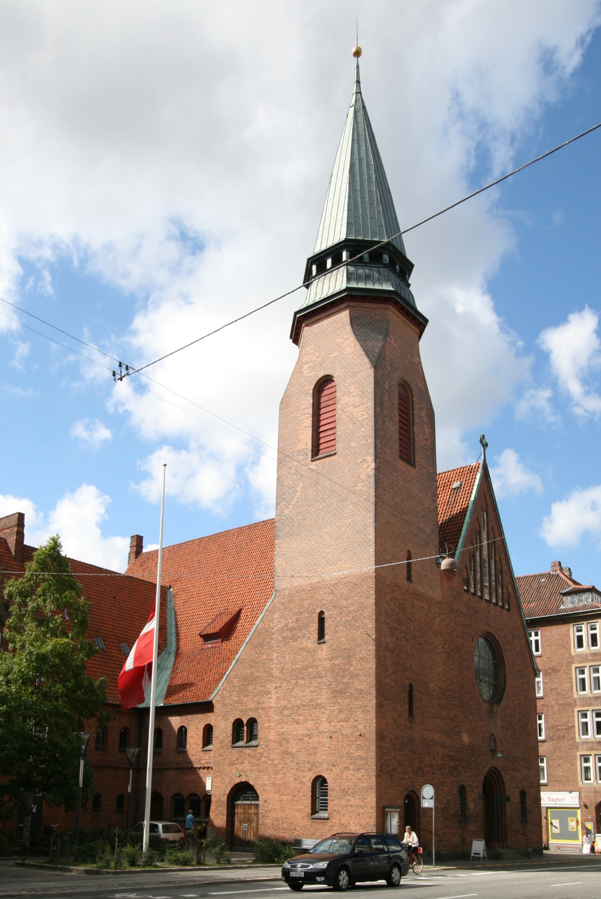 Godthaabskirken in Copenhagen, Denmark.